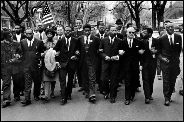 MANIFESTACION